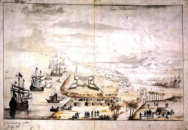 Festung Großfriedrichsburg um 1688 Handzeichnung, 1688